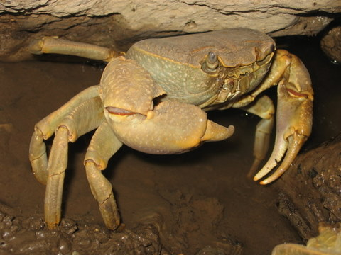 Potamon potamios, סרטן הנחלים